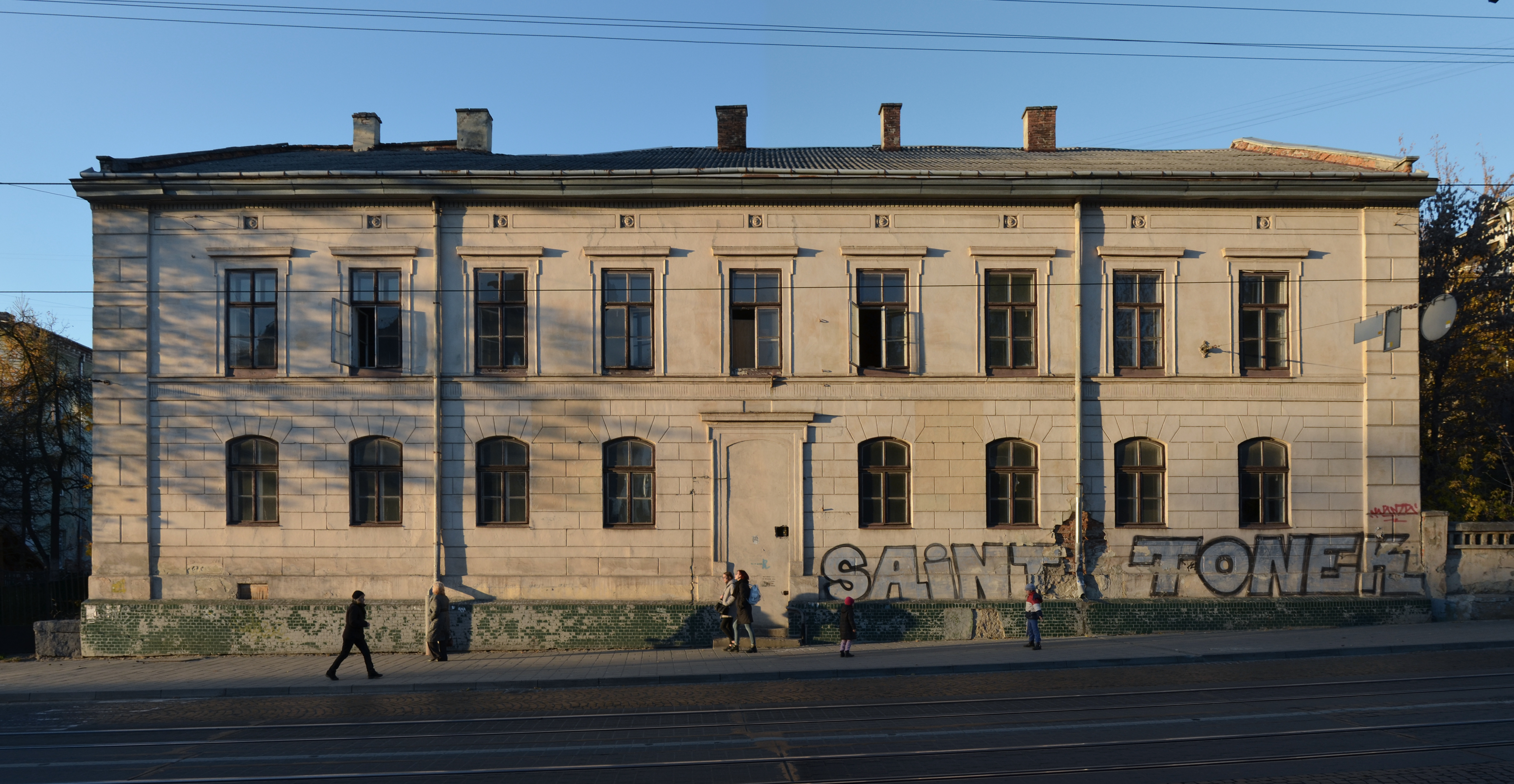 Будинок № 37 на вулиці Личаківській у Львові. Знесений у червні-липні 2018 року.